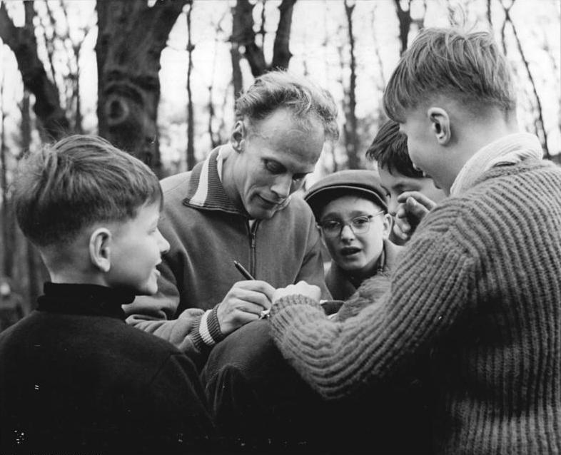 Siegfried Valentin Zentralbild Gößler 31.3.1961 Berliner Waldlaufmeisterschaften Bei herrlichem Sonnenschein stellten sich zu den diesjährigen Berliner Waldlaufmeisterschaften im Plänterwald etwa 300 Aktivo dem Starter. Die ASK-Läufer Valentin und Hannemann wurden ihrer Favoritenrolle gerecht und siegten überlegen. UBz: Siegfried Valentin, Sieger im 2500-m-Lauf gibt der Schuljugend Autogramme.